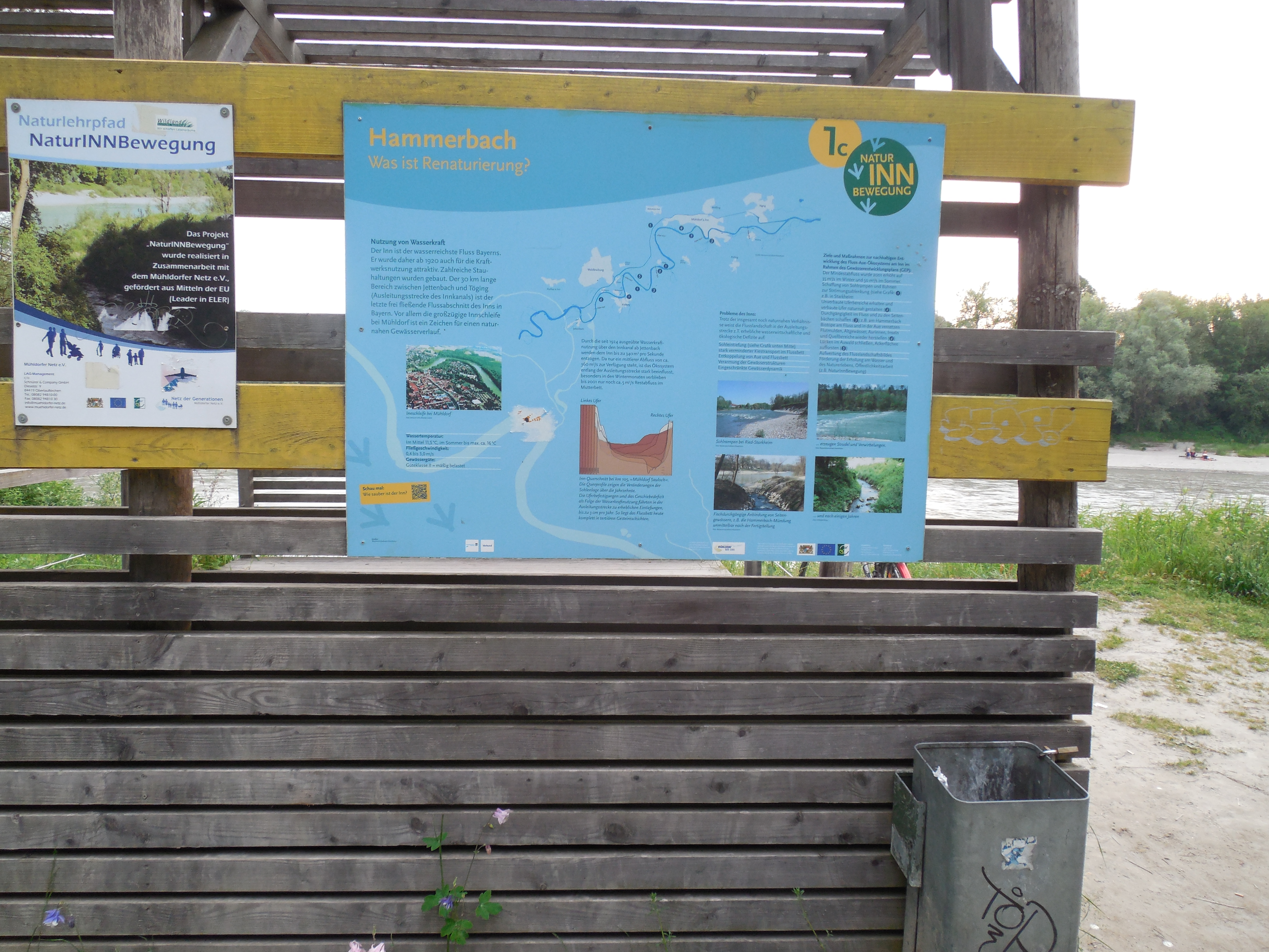 Schutzgebietidendität und Position sind im Dateinamen enthalten incl. geographische Länge und Breite. Innschleife Mühldorf